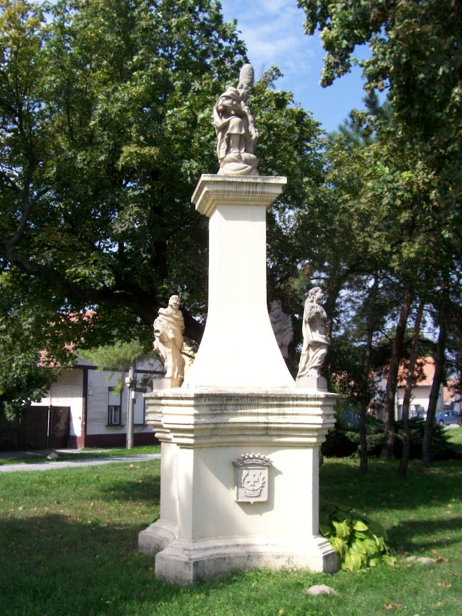 Rusovce - Stĺp Najsvätejšej Trojice z r. 1748